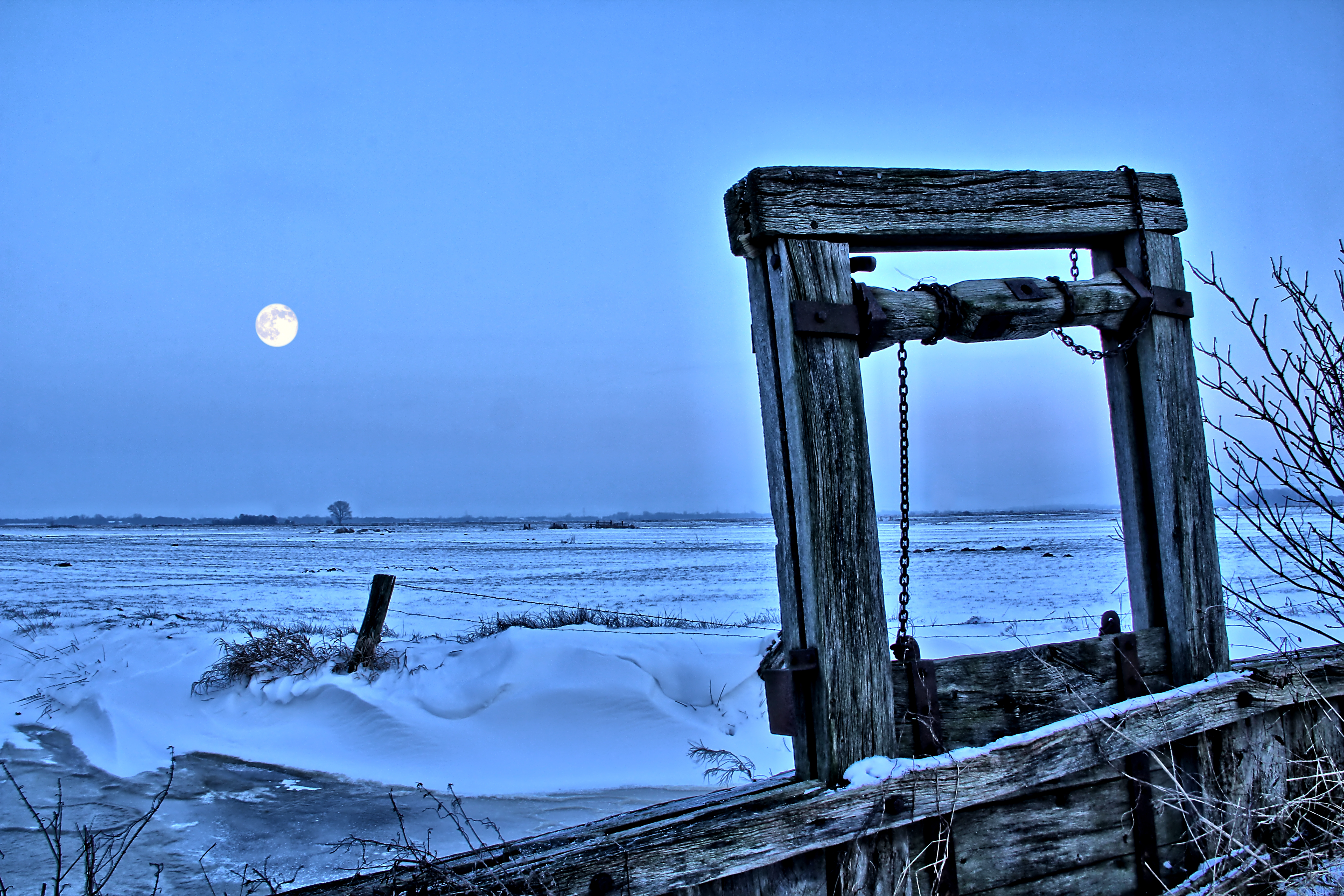 Altes Wasserwehr im Blockland, Bremen